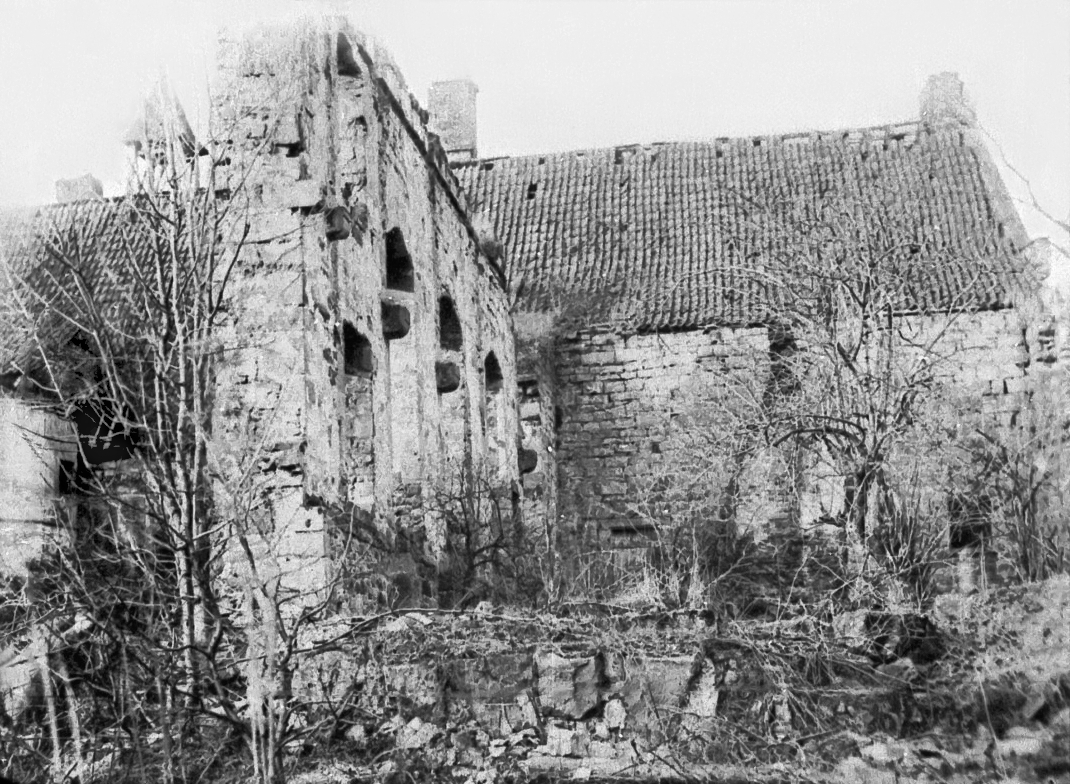 Arnold Löhnberg: Ruinen des Ostflügels der Burg Altena in Ansicht von Innen nach Norden